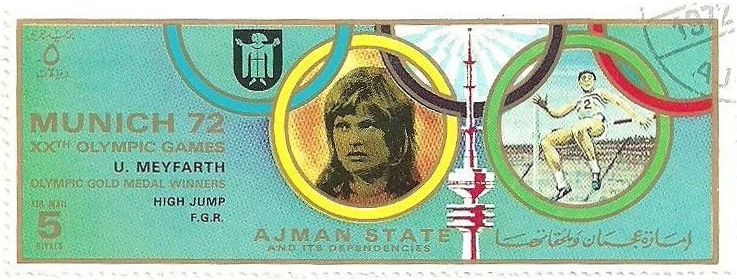 Ulrike Meyfarth